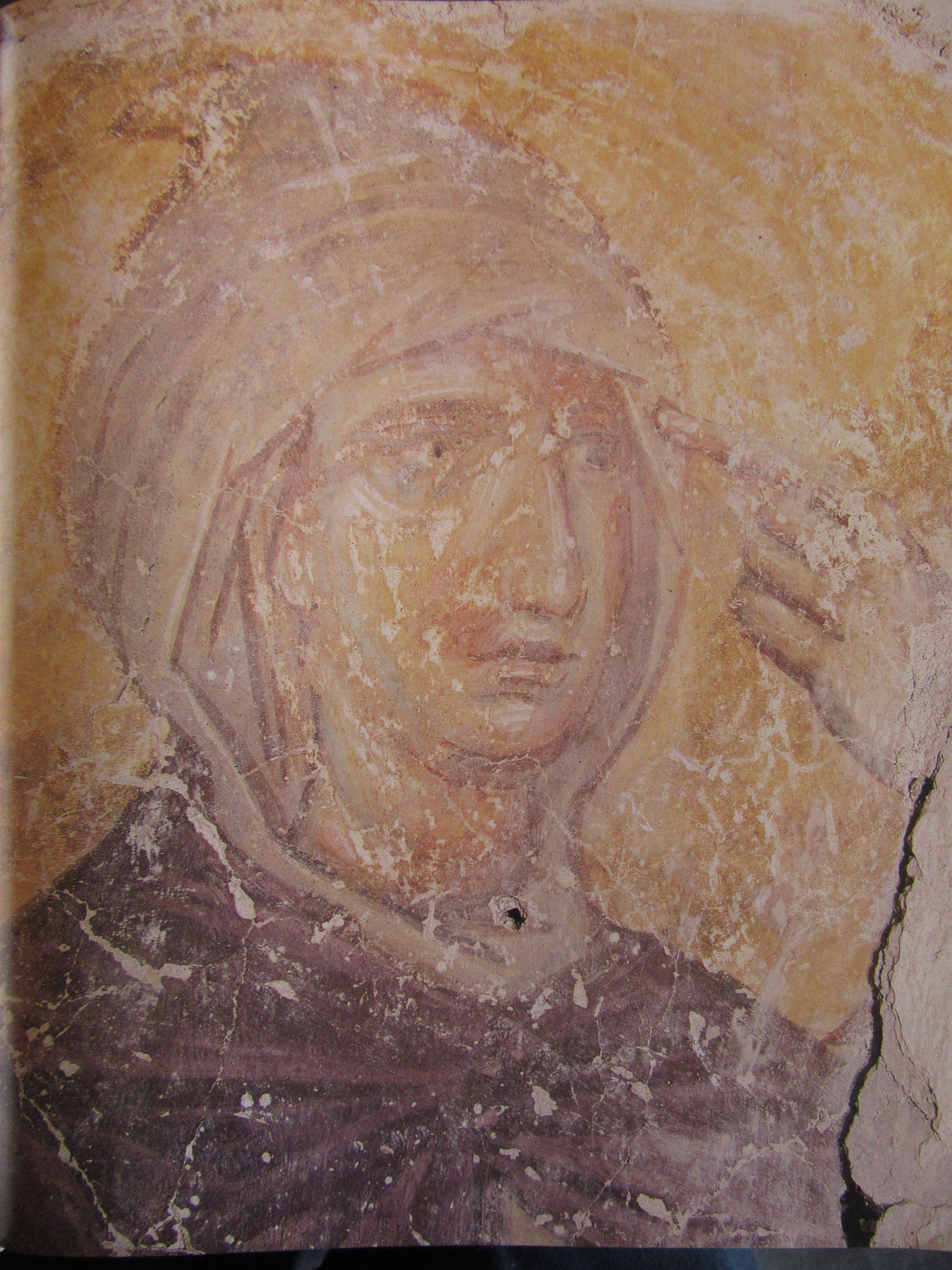 Fresque de l'église de la Nativité-sur-les-champs-rouges à Novgorod